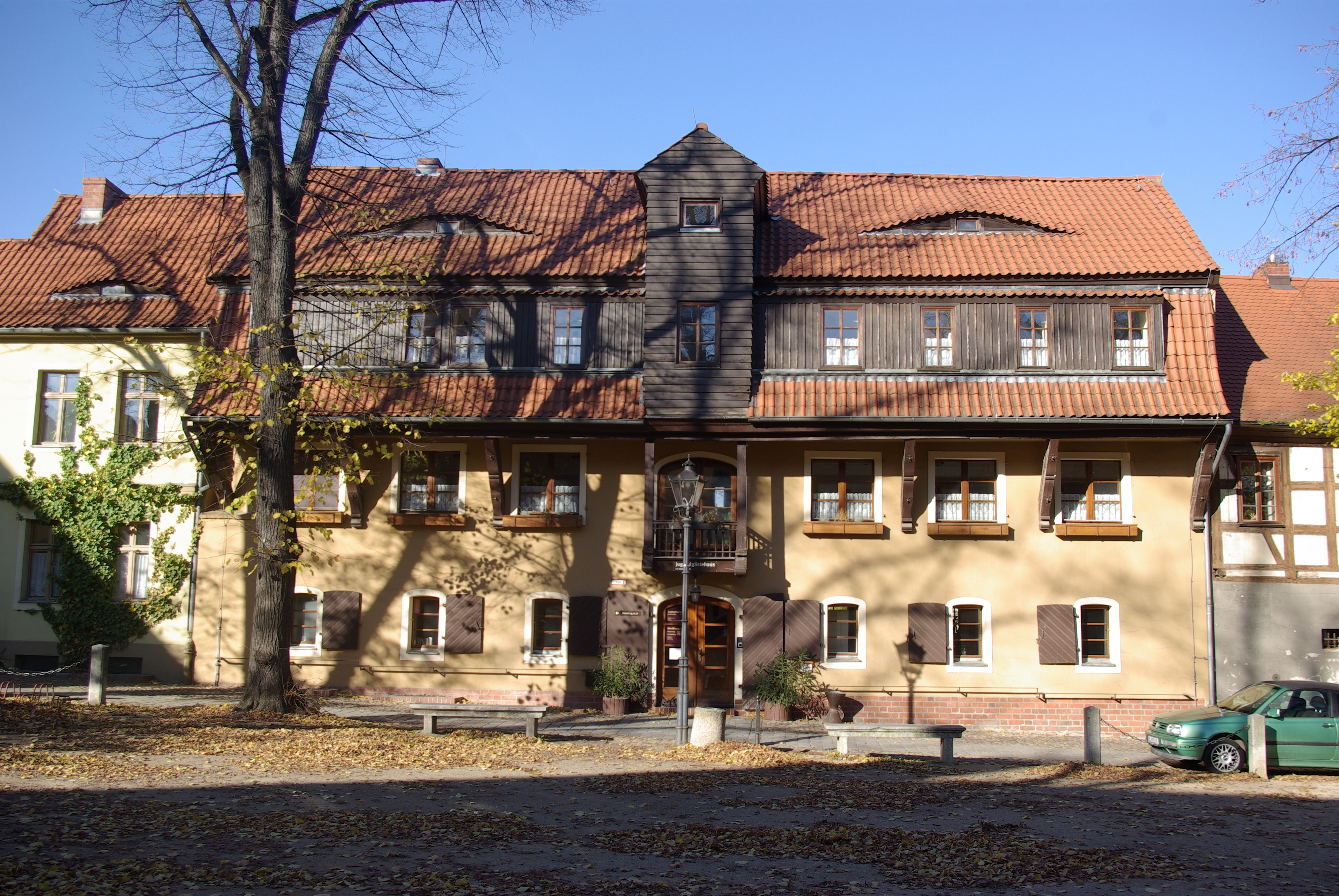 Cottbus in Brandenburg. Das Haus am Klosterplatz 3 steht unter Denkmalschutz. Heute befindet sich dort eine Jugendherberge.